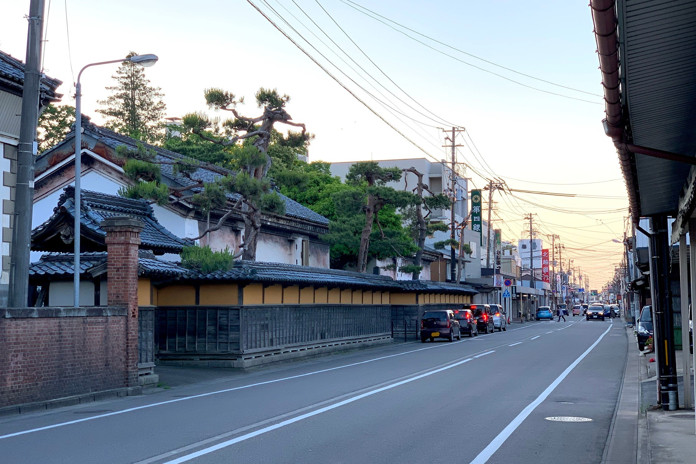 新潟県道7号新津村松線 五泉市本町付近（2020年5月）